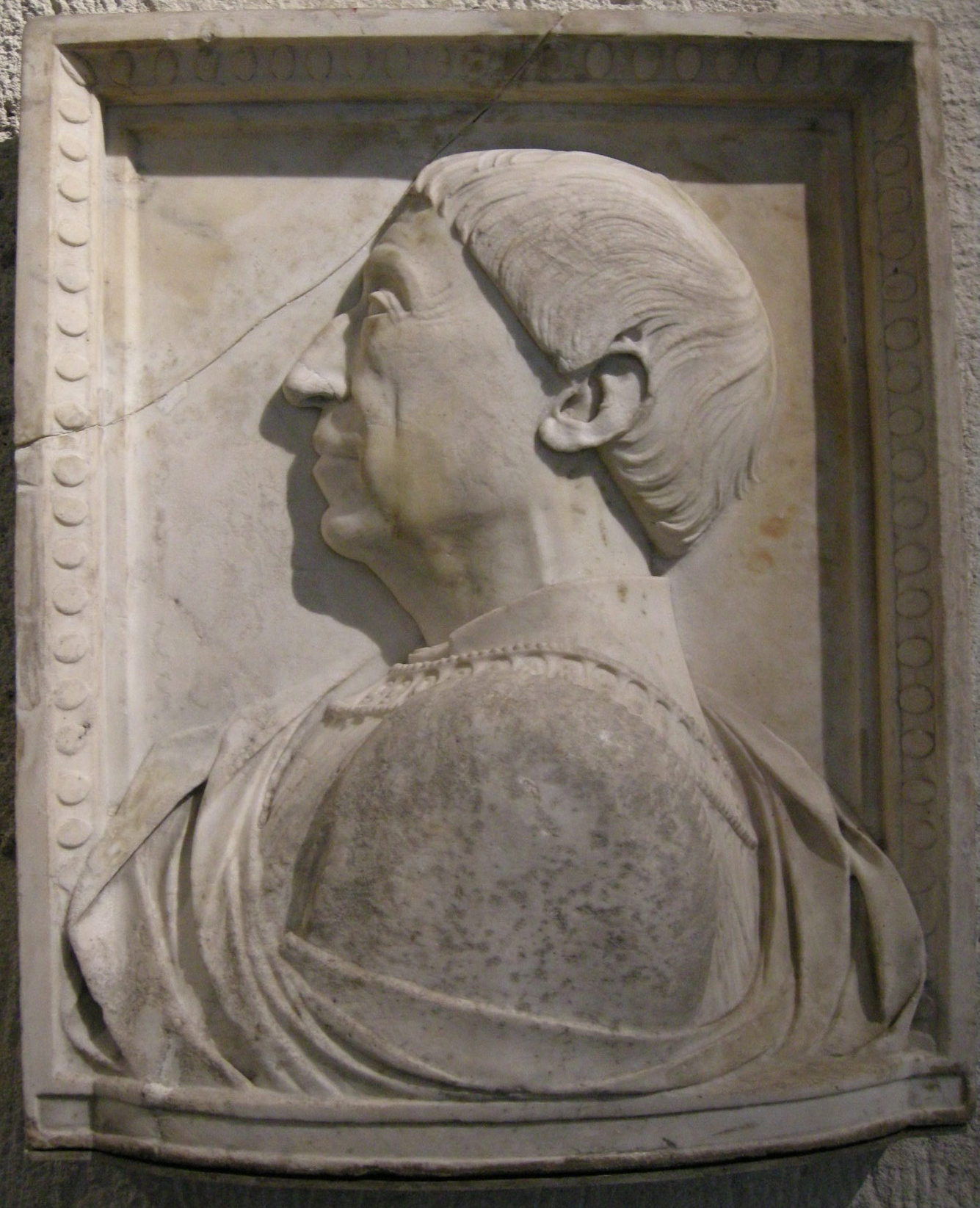 Mino da fiesole (attr.) alfonso I d'aragona, il magnanimo.JPG